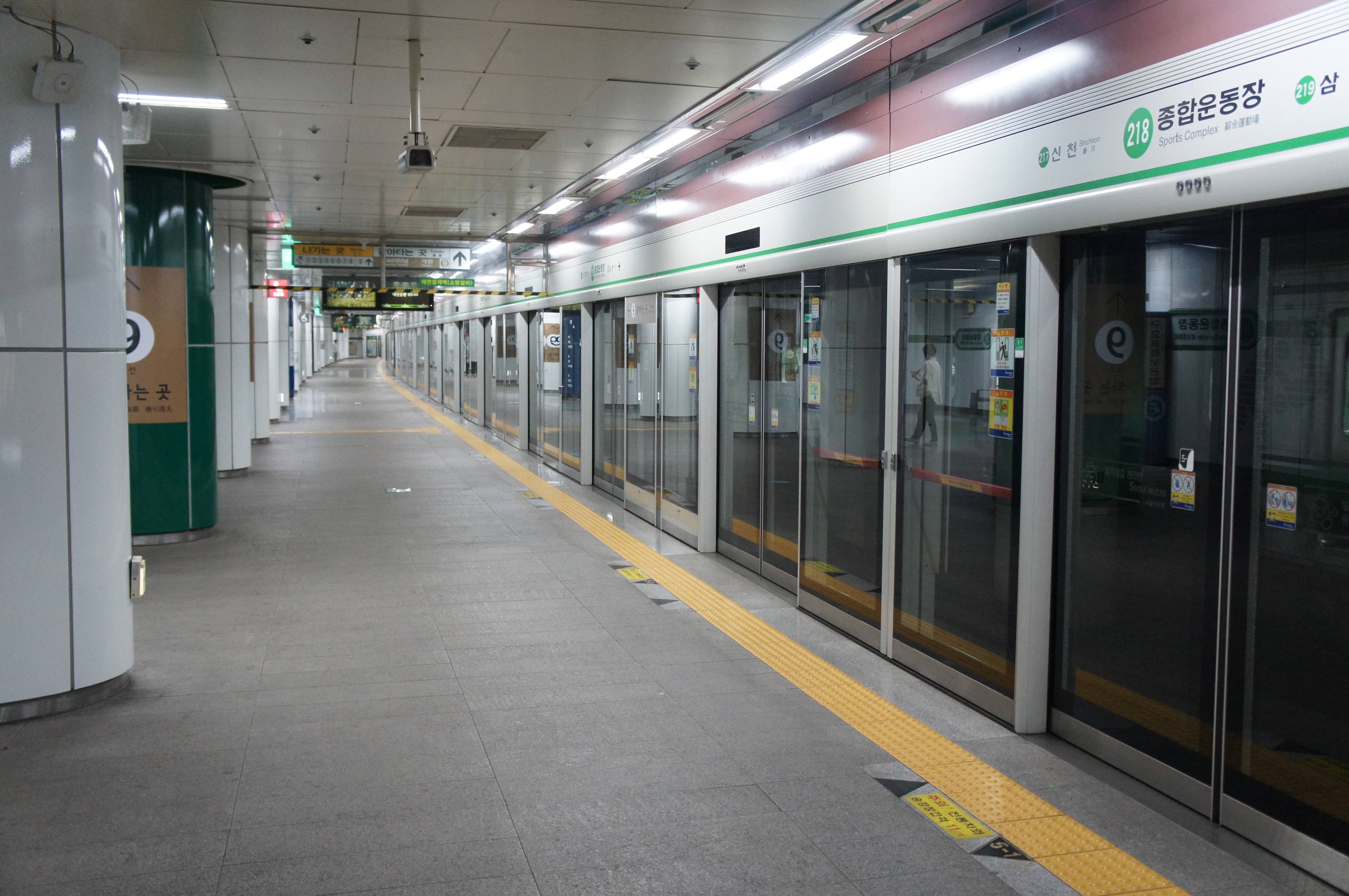 2호선 종합운동장역 승강장